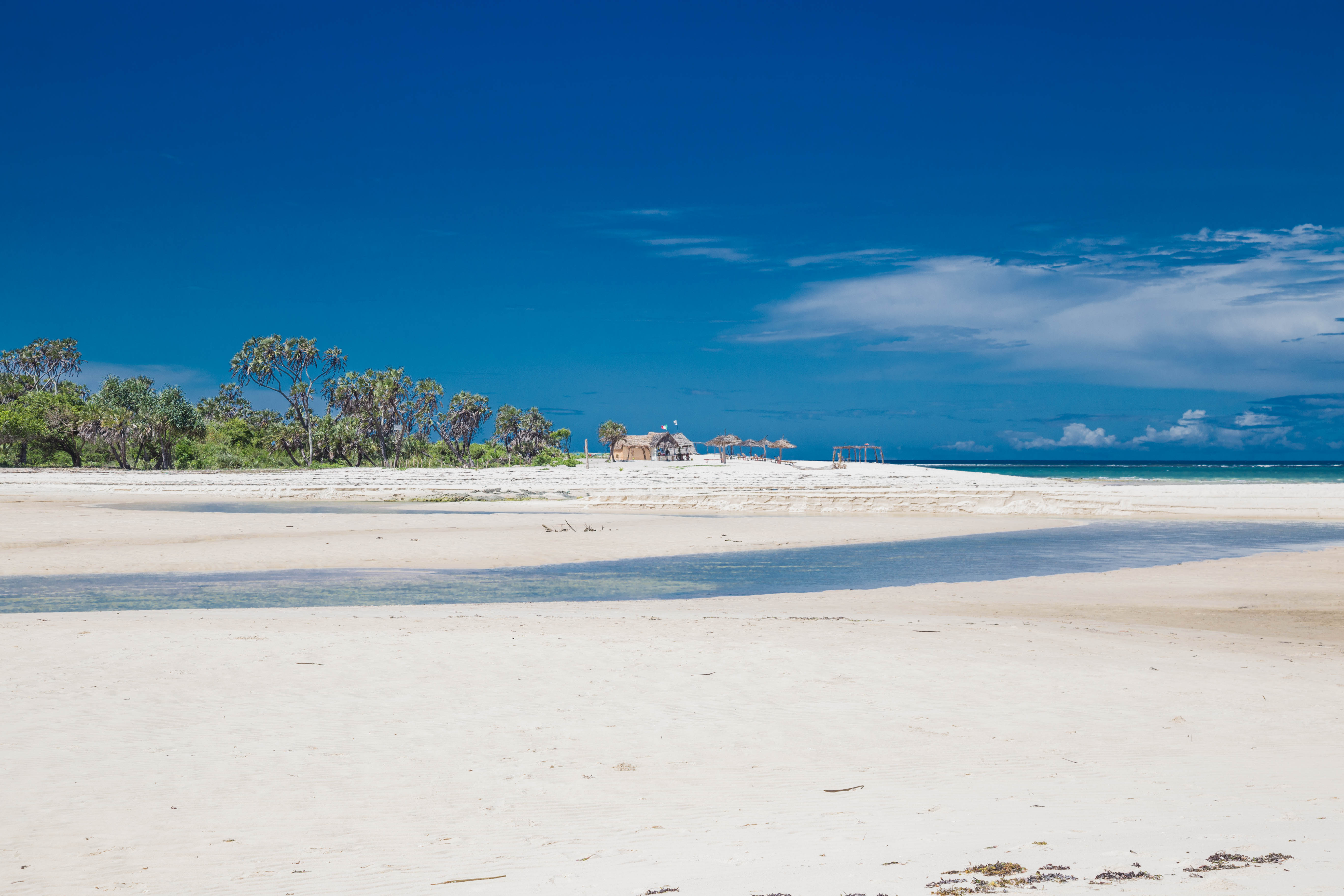 Auch in Diani Beach findet man ruhige Abschnitte